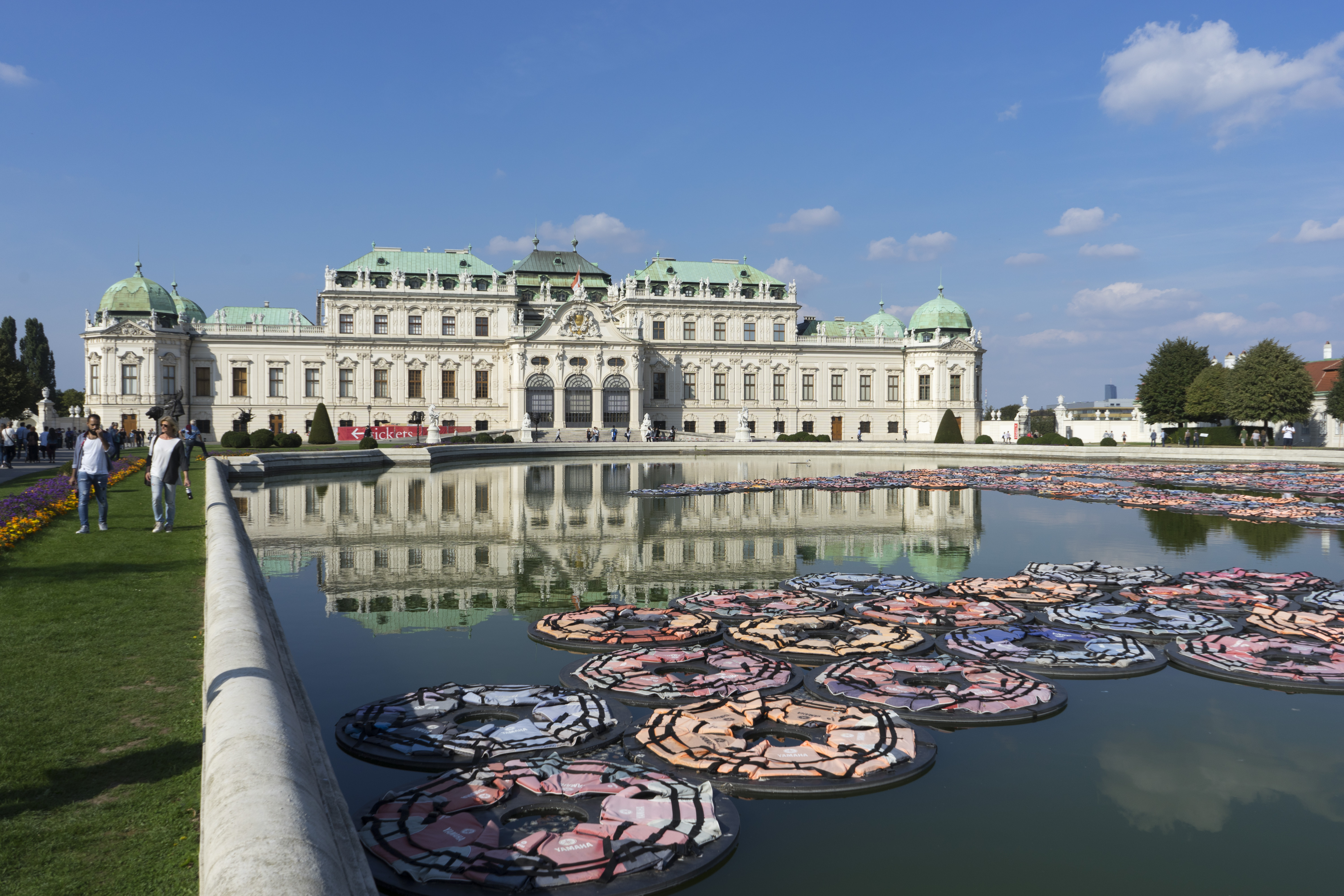 Ai Weiwei translocation – transformation exhibition belvedere. Swim wests and chinese signs of zodiac